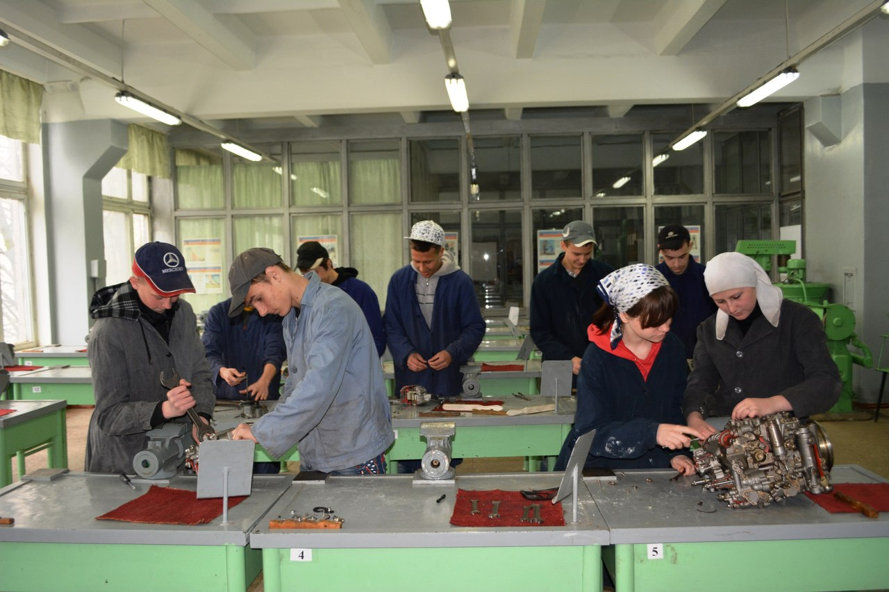 вчилище моторобудівник